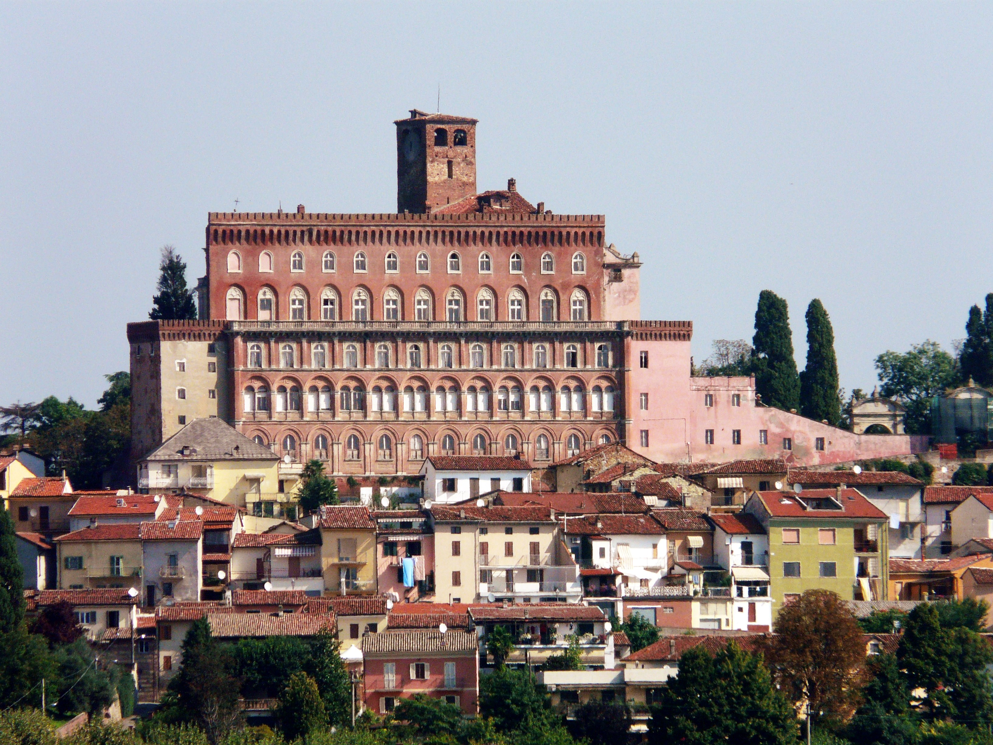 Castello di San Giorgio Monferrato, Piemonte, Italia